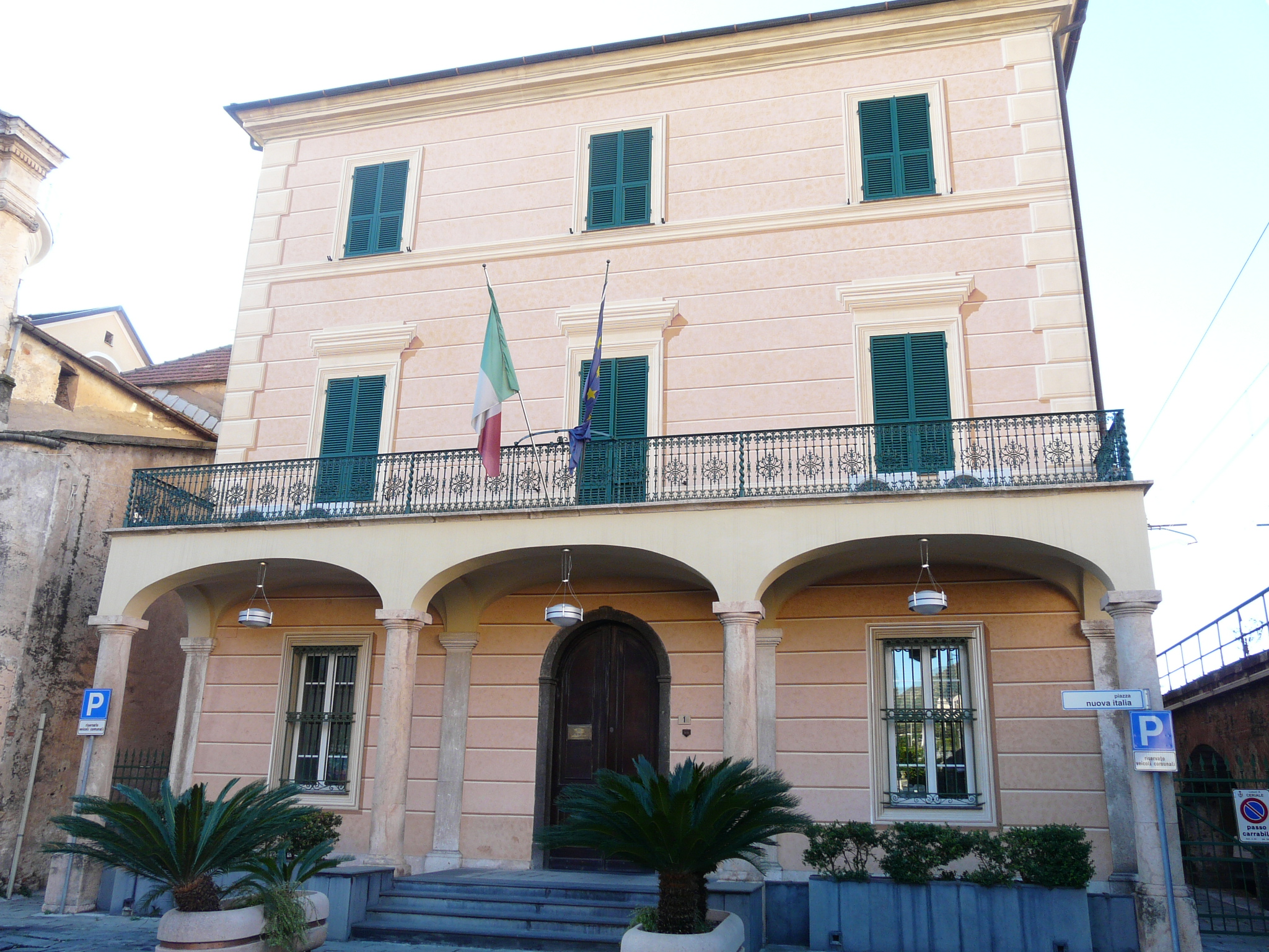 Municipio di Ceriale, Liguria, Italia